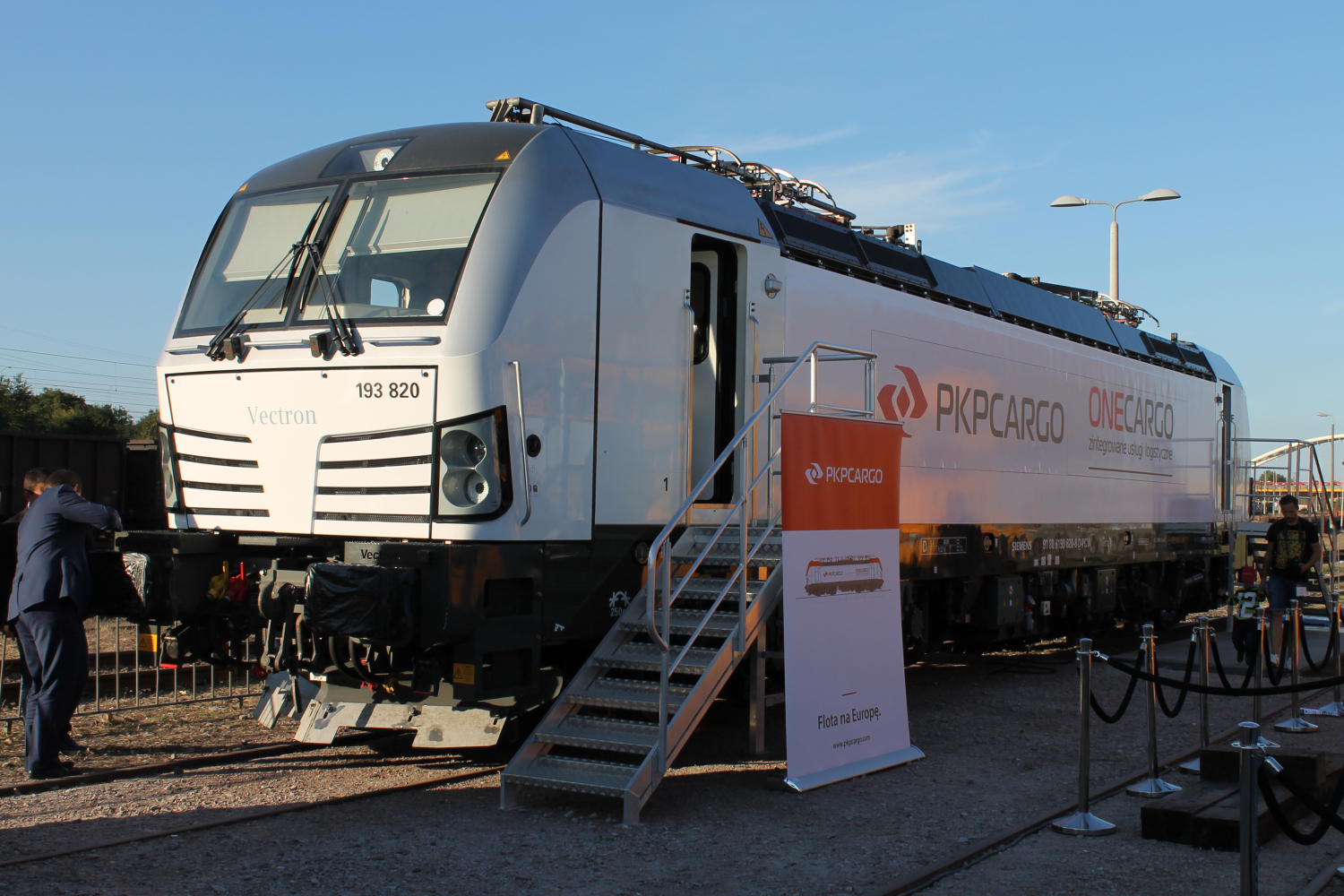 Elektrowóz Siemens Vectron MS 193 820 podczas targów Trako 2015. The making of this document was supported by Wikimedia Polska Association, within Wikigrant no. WG 2015-34.